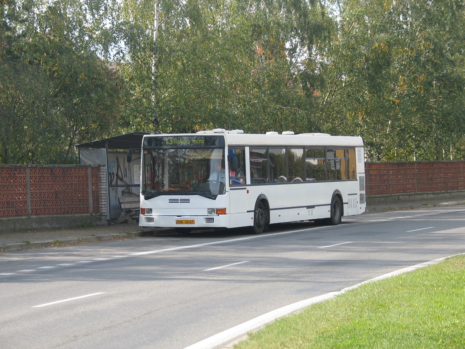 Ikarus 412, Tábor. Ulice Kapitána Jaroše.